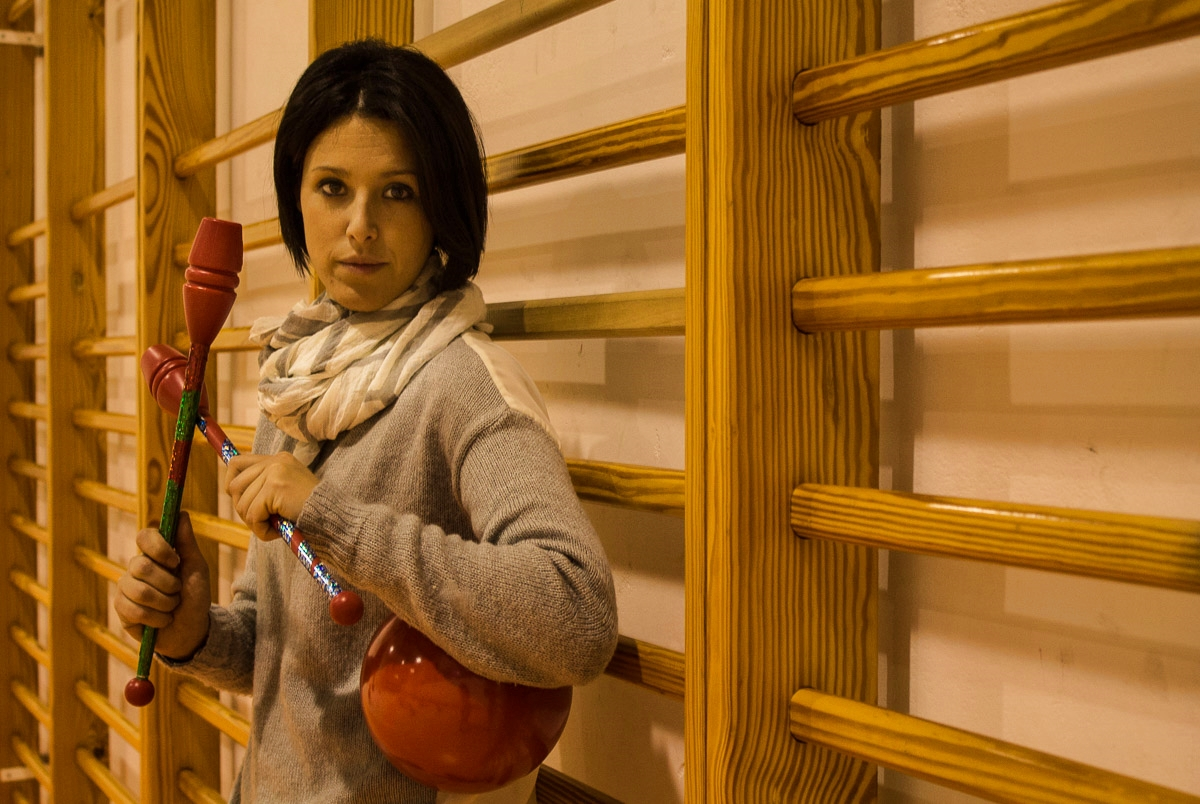 La gimnasta rítmica Tania Lamarca en el Centro Cívico Ibaiondo de Vitoria en diciembre de 2016.